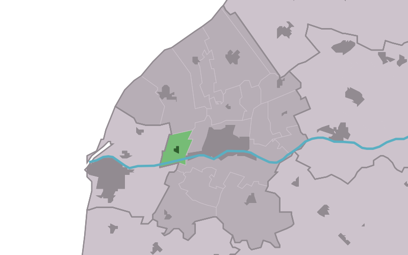 Kaartsje fan himrik fan Hjerbeam